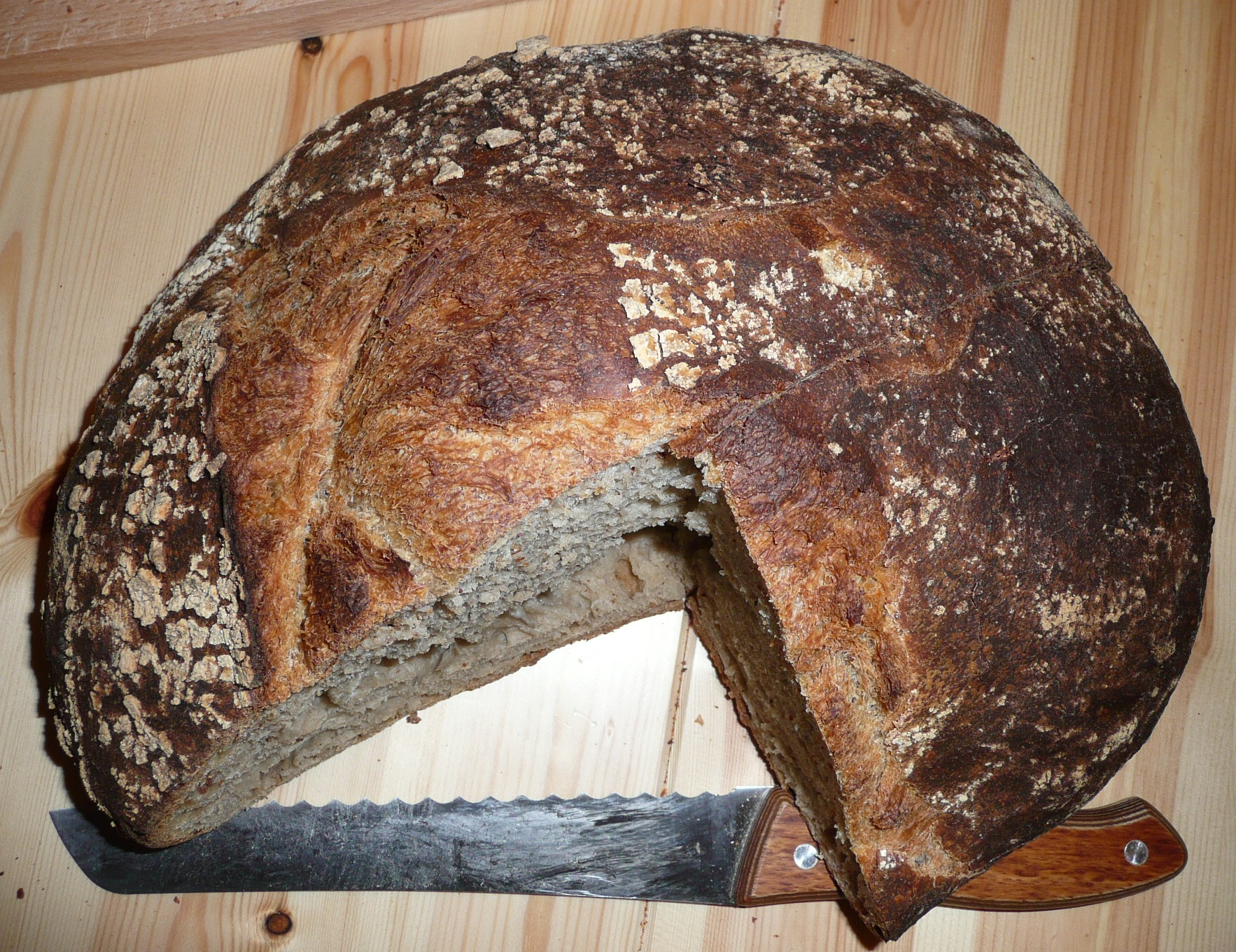 Une miche de pain d'environ 1,6 kg, se conserve 8 jours d'après le boulanger